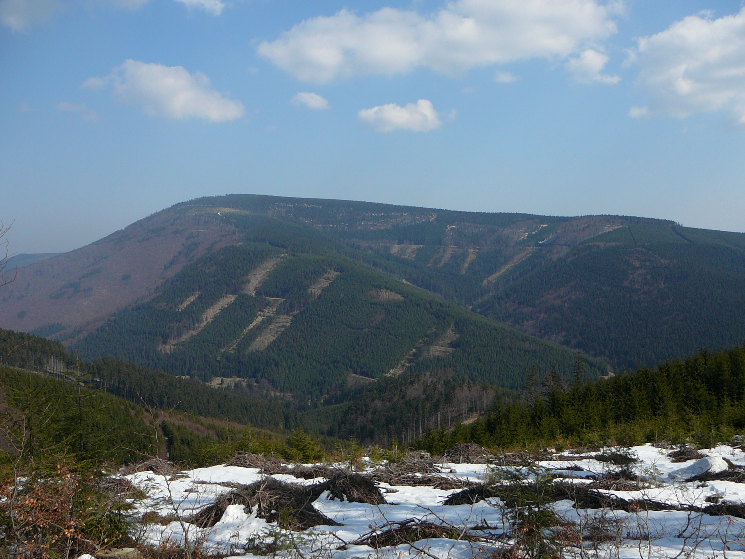 Travný (1203 m), pohled z úbočí Lysé hory